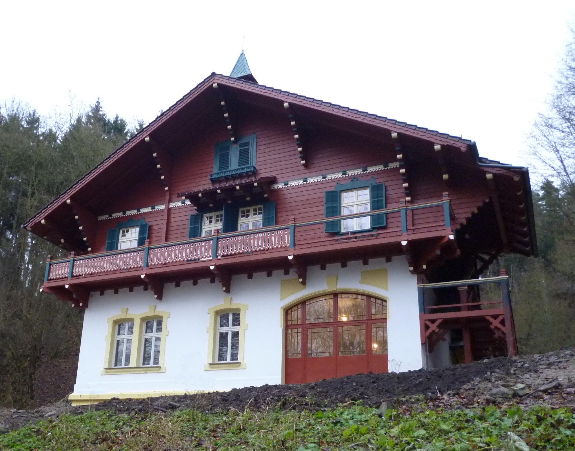 Mattoni Muzeum se nachází v opraveném pavilonu Löschner.